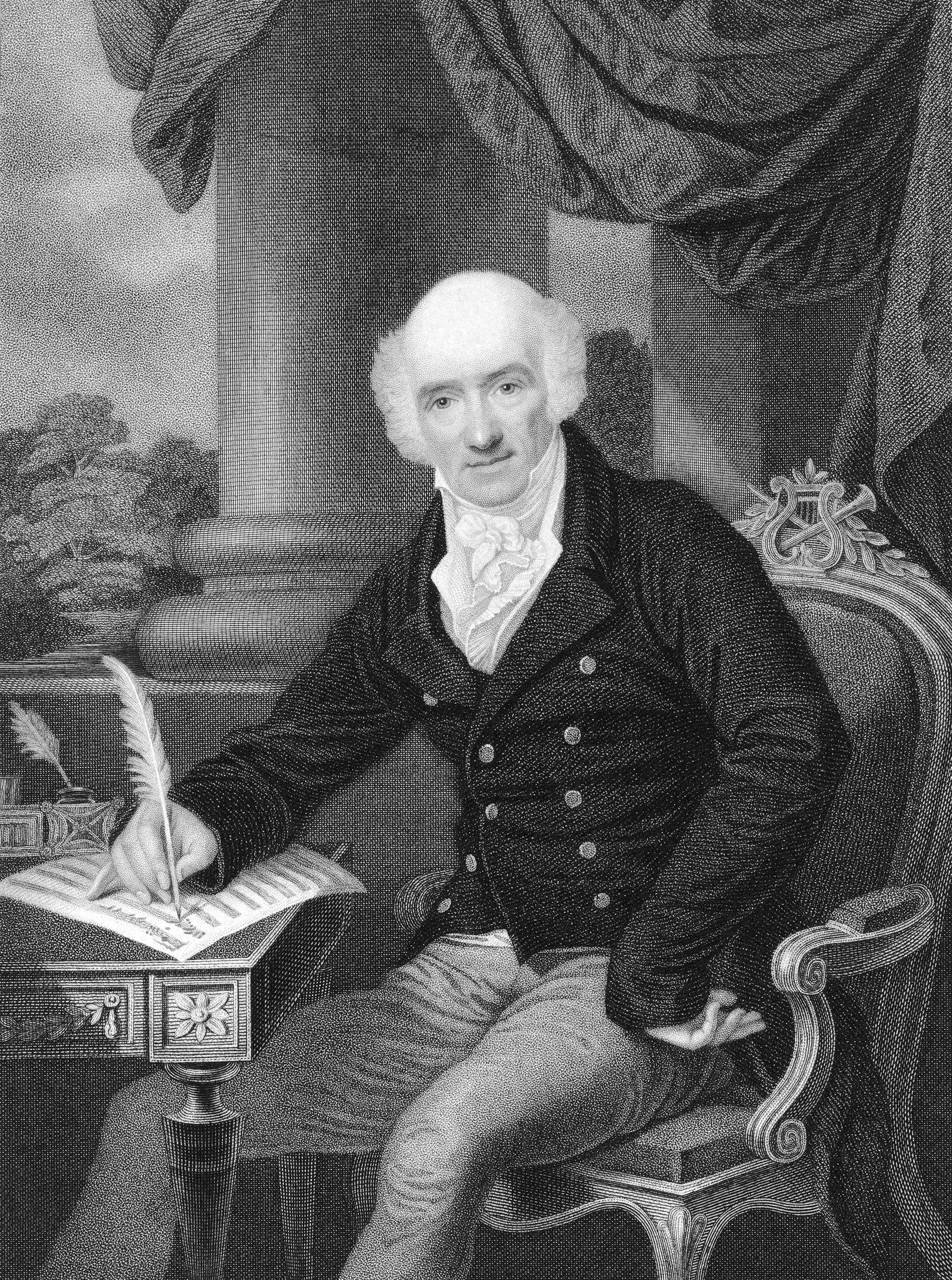 Depicted person: Giovanni Battista Viotti